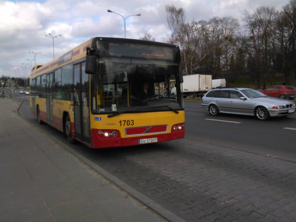 łódź , 27.06.2016 r. linia 56